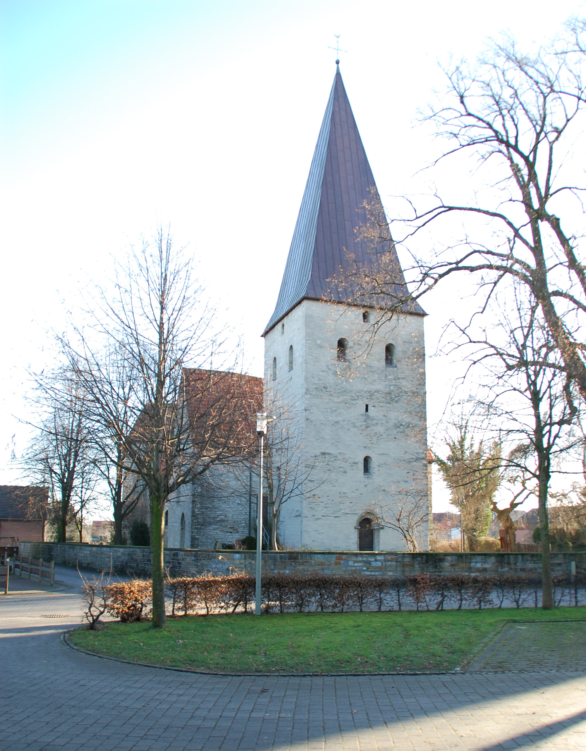 Katholische Kirche Mönninghausen, Geseke